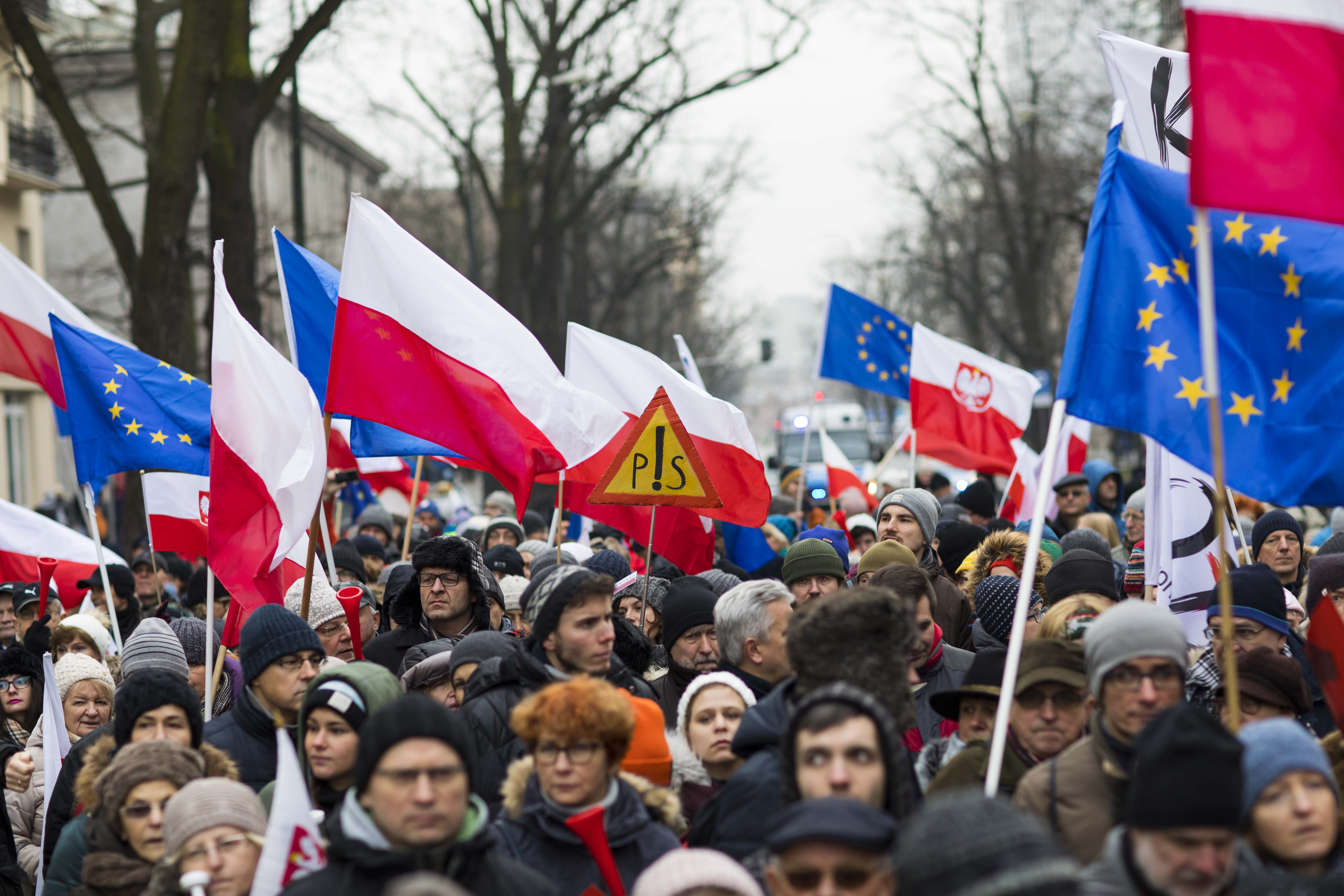 Manifestacja zorganizowana przez Komitet Obrony Demokracji - podziękowanie ustępującemu Prezesowi Trybunału Konstytucyjnemu Andrzejowi Rzeplinskiego w al. J.Ch. Szucha w Warszawie